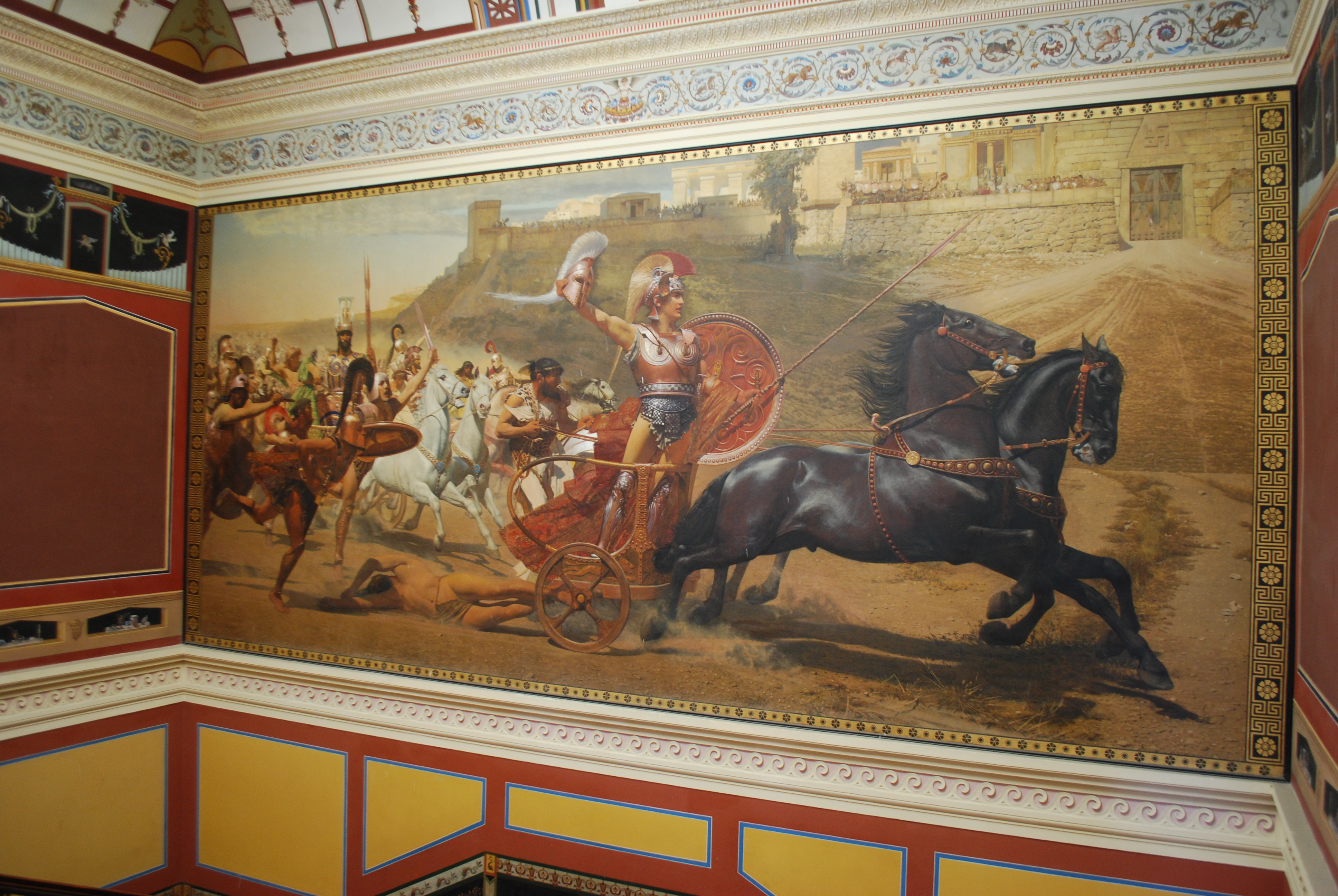 Vue de l'intérieur de l'Achilleion à Corfou.